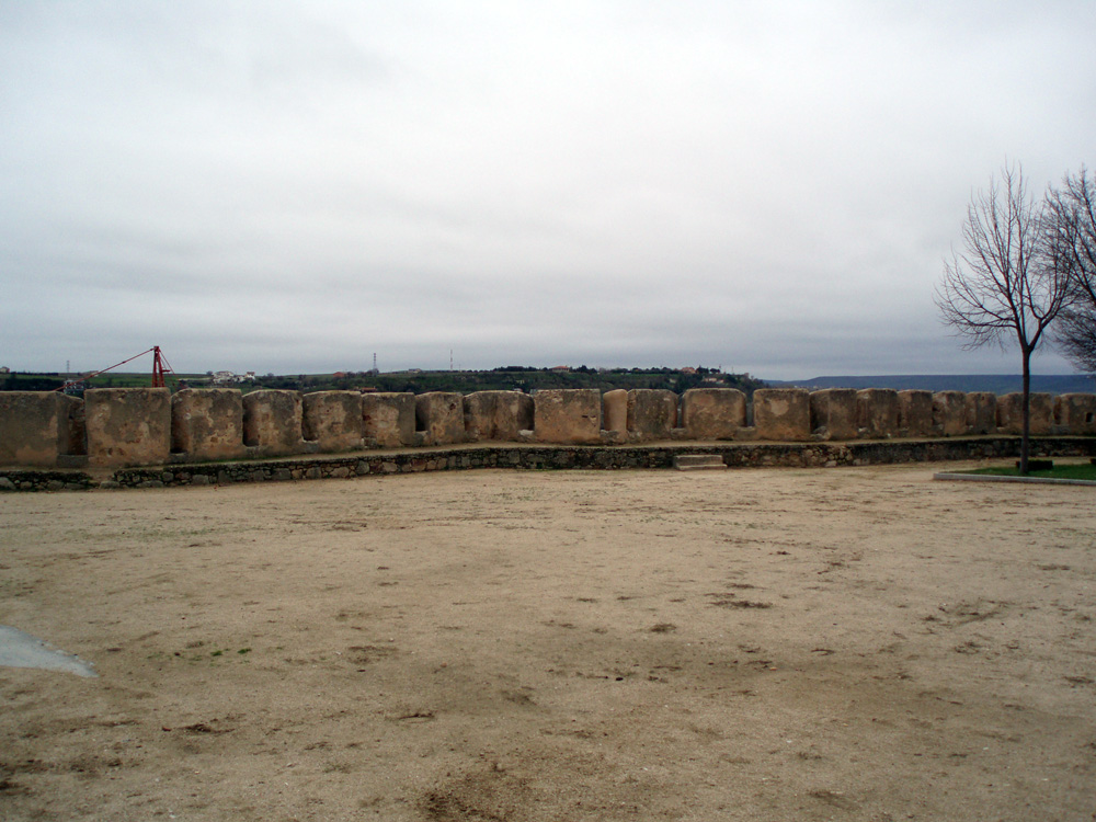 Muralla de Zamora en 2006